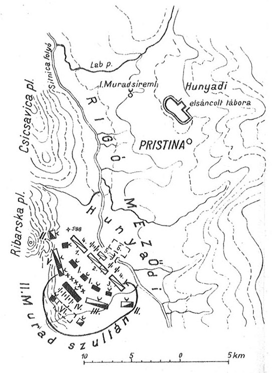 Битва на Косовом поле (1448), 19 октября Армия Хуньяди: 1. Правое крыло, Бенедикт Лозонч 2. Центр, Янош Секеш 3. Левое крыло, Иштван Банфи и Дан 4. Пехота и артиллерия 5. Резерв, Ференца Таллочи 6. Фургоны Армия султана Мурада: I) Азапы II) Акынджи с флангов III) Правое крыло, кавалерия Анатолии IV) Центр, Пехота и артиллерия V) Левое крыло, Кавалерия Румелии VI) Ставка • хххх валы, верблюды, линия щитов